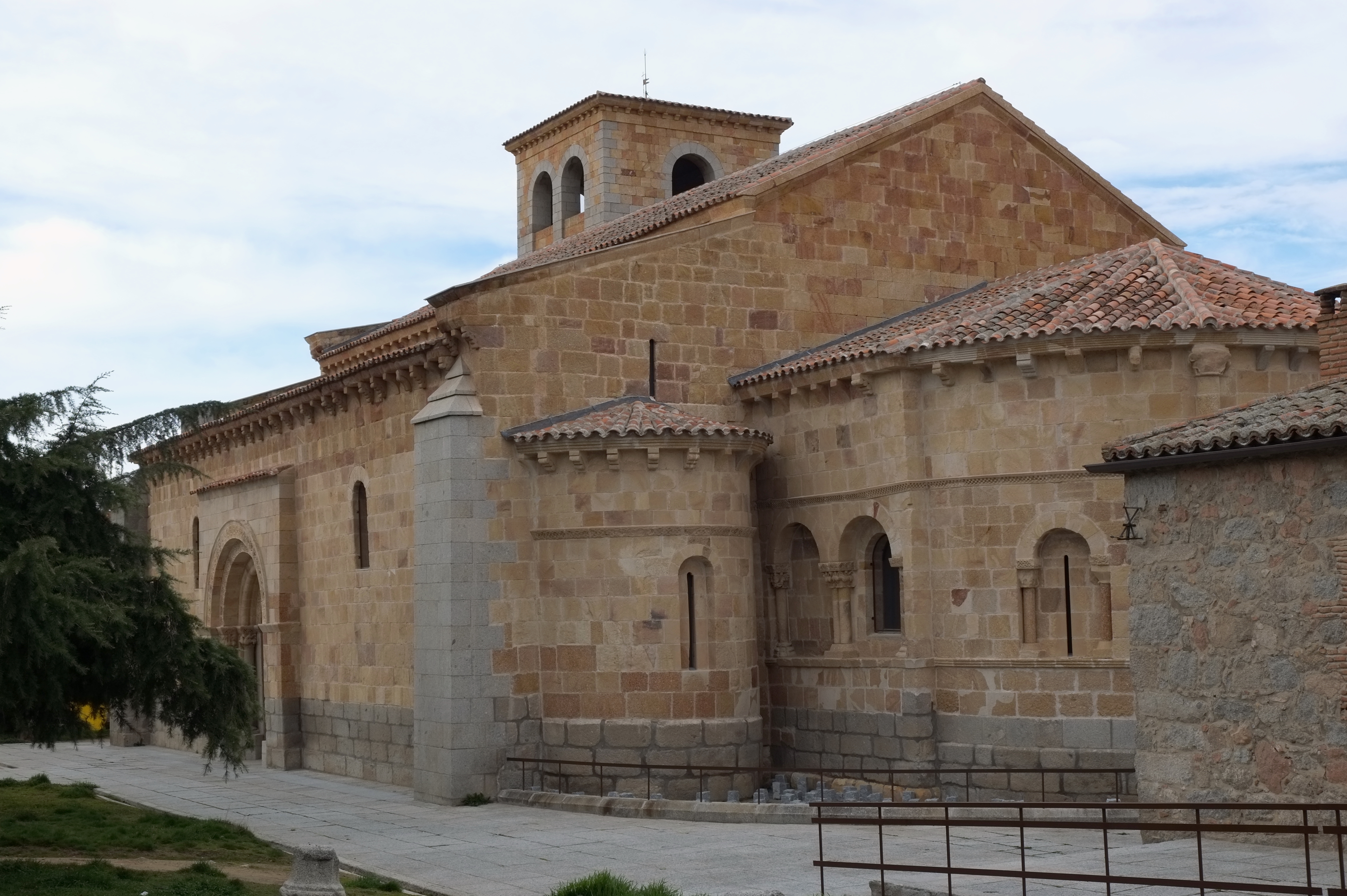 Kirche San Andrés in Ávila (Kastilien-León/Spanien), Ansicht von Osten